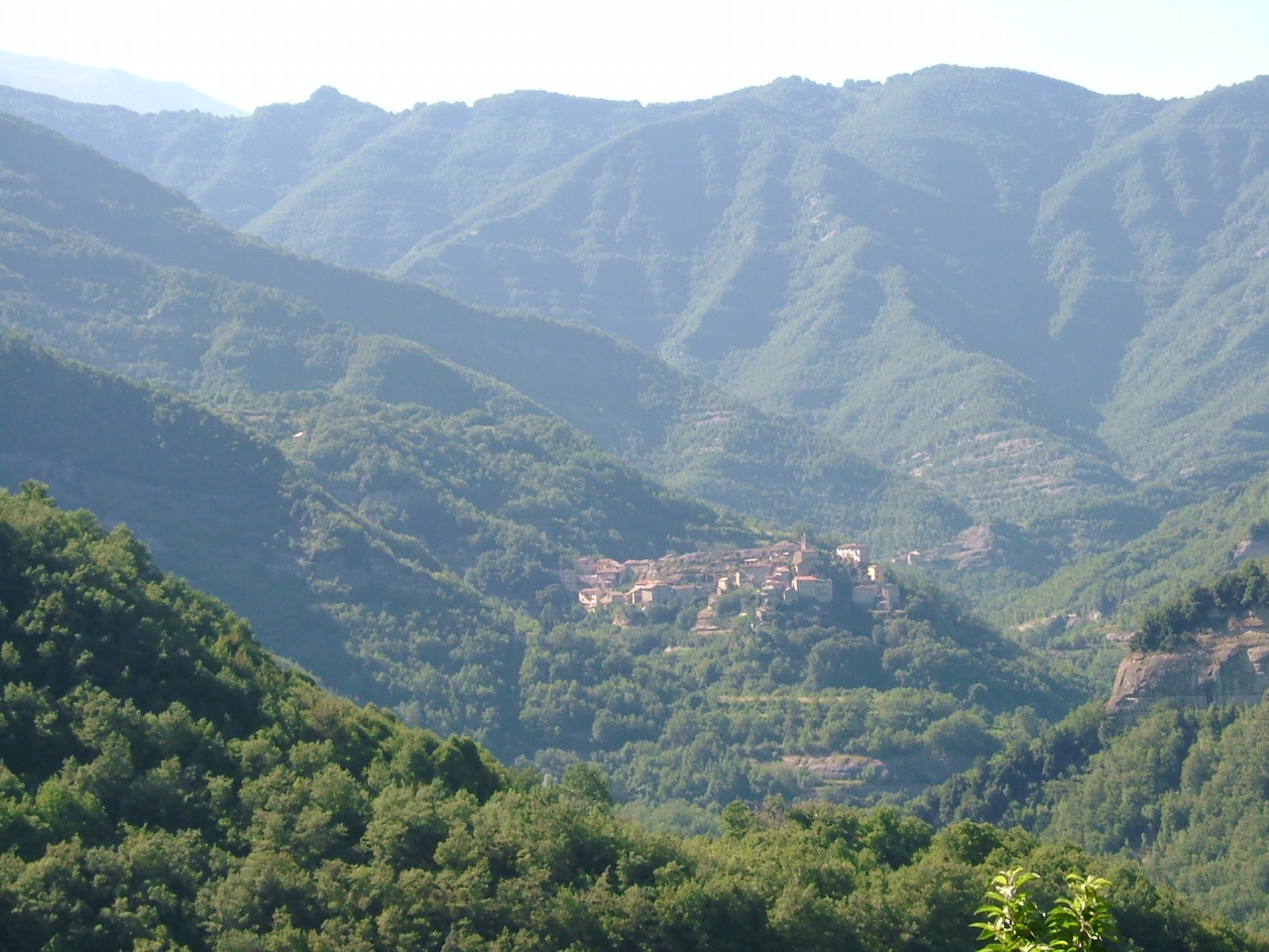 Tallacano